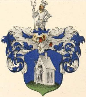 Scheurmanni suguvõsa aadlivapp